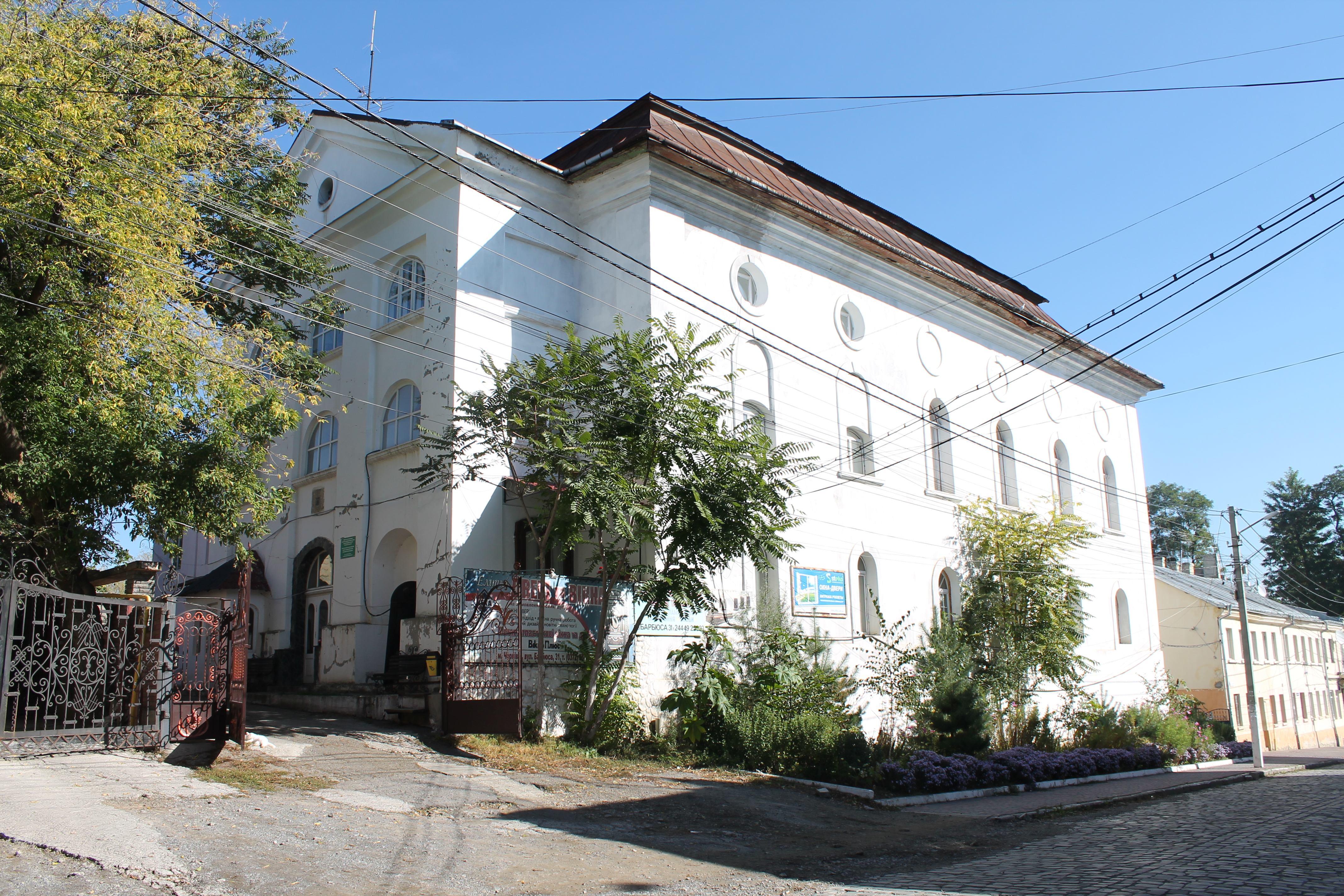 Синагога, Чернівці, Барбюса Анрі, 31